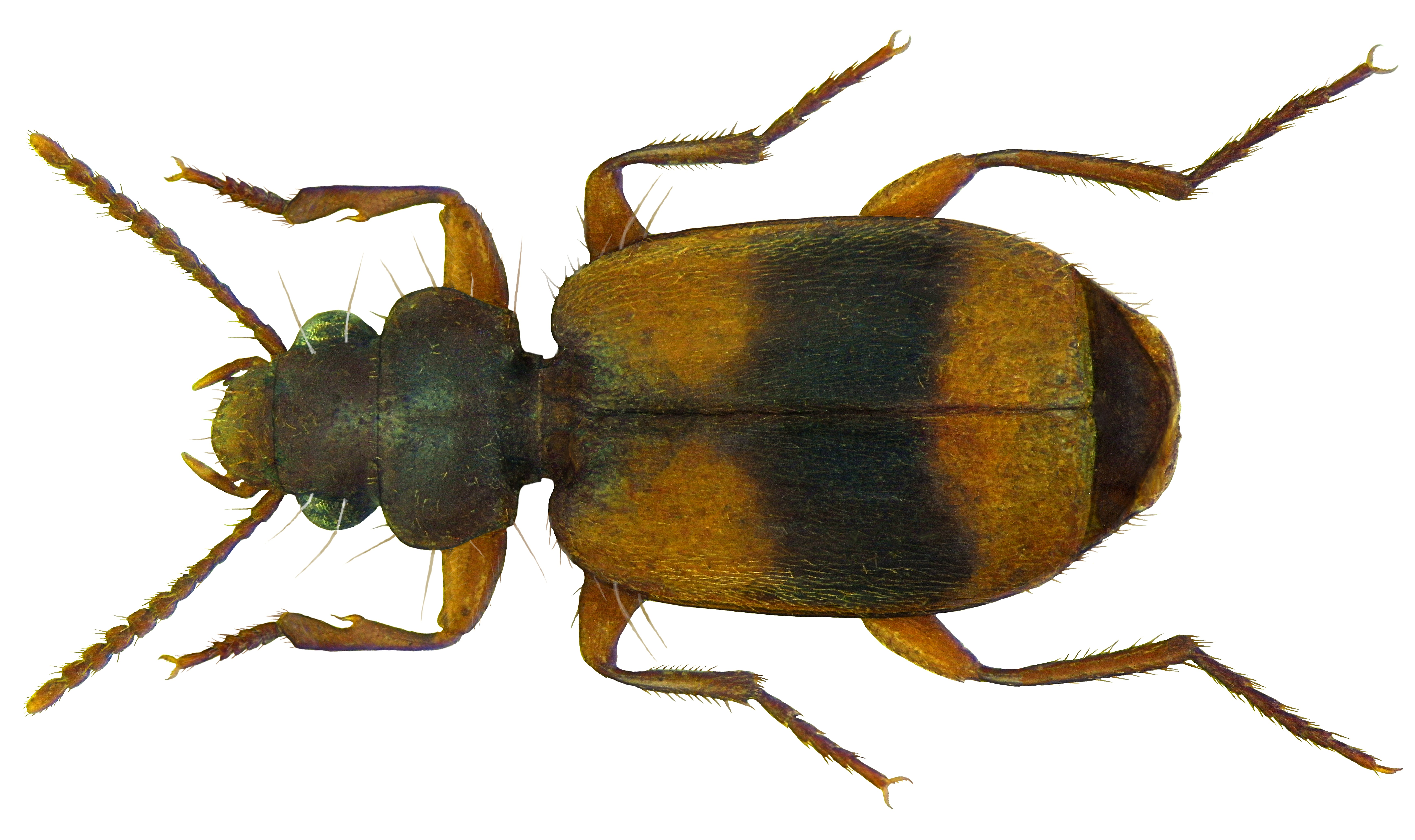 Familie: Carabidae Groesse: 3,5-4,5 mm Verbreitung: Kosmopolit, in Europa nicht eingebürgert, oft mit Nüssen in Seehäfen eingeschleppt Oekologie: lebt räuberisch von Vorratsschädlingen Fundort: England Photo: U.Schmidt, 2011